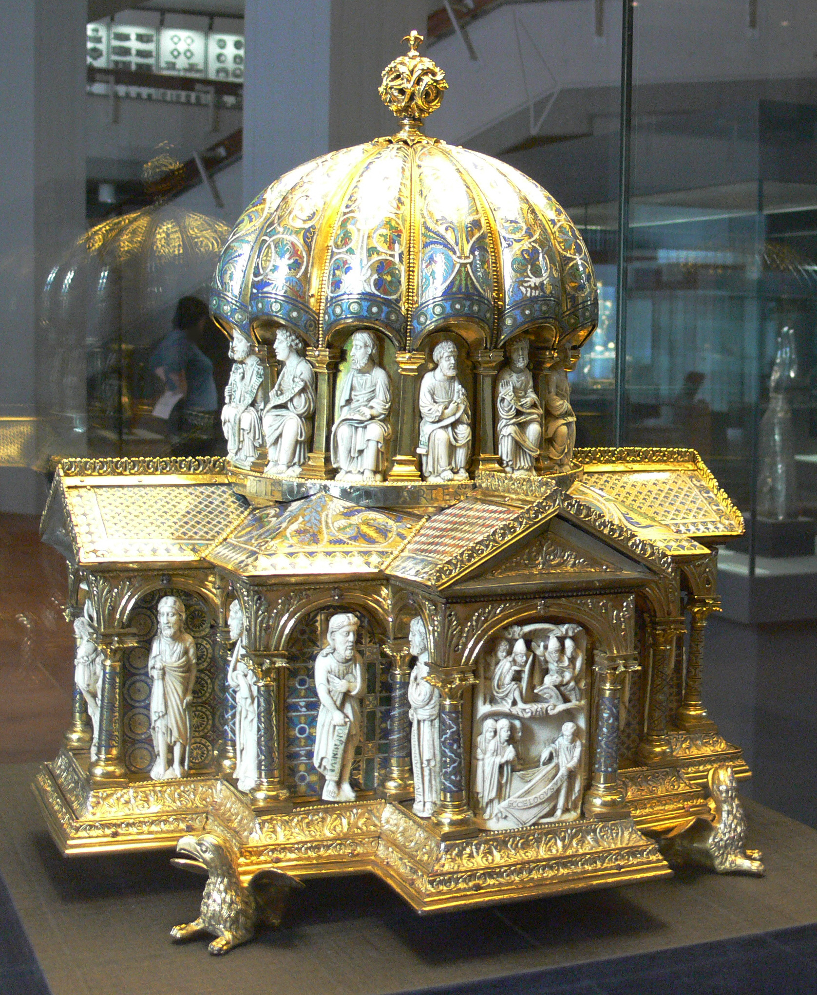 Kuppelreliquiar aus dem Welfenschatz, Köln, Ende 12. Jh.; Kunstgewerbemuseum Berlin